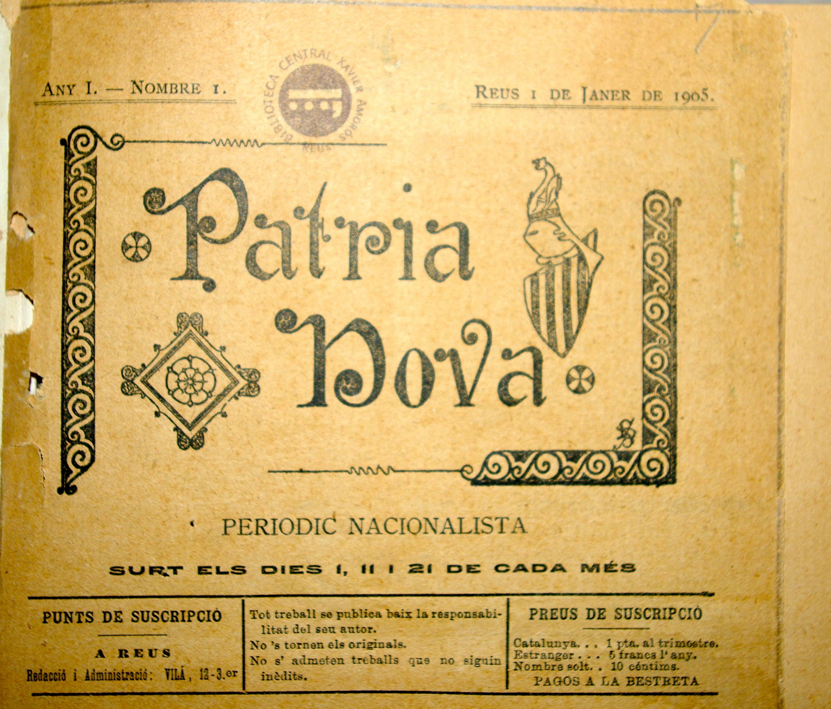 Portada de Patria Nova